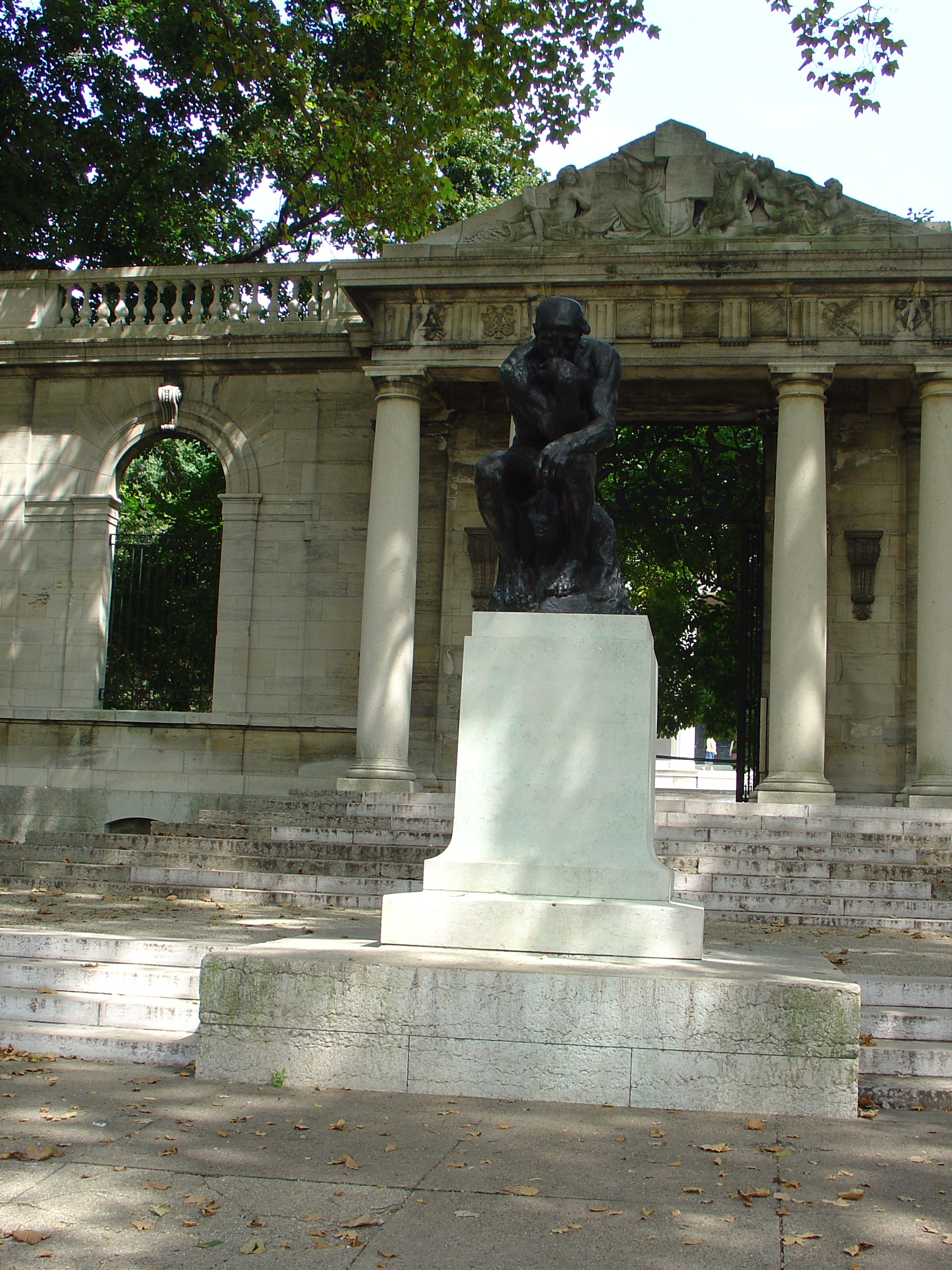 Musée rodin de Philadelphie